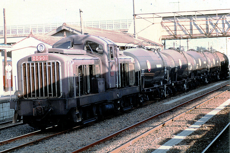 鹿島鉄道 DD901牽引貨物列車